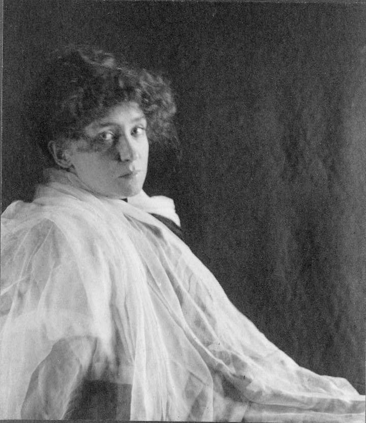 Actress Minnie Maddern Fiske